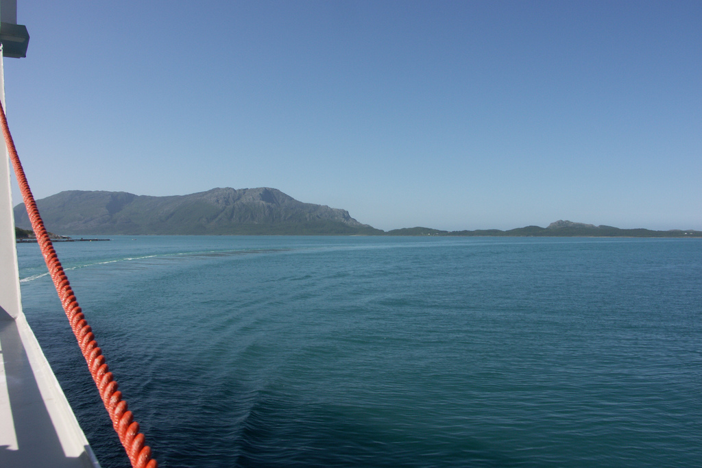 Frå ferja mellom Horn og Anddalsvågen (Riksveg 17), ytst i Velfjorden.